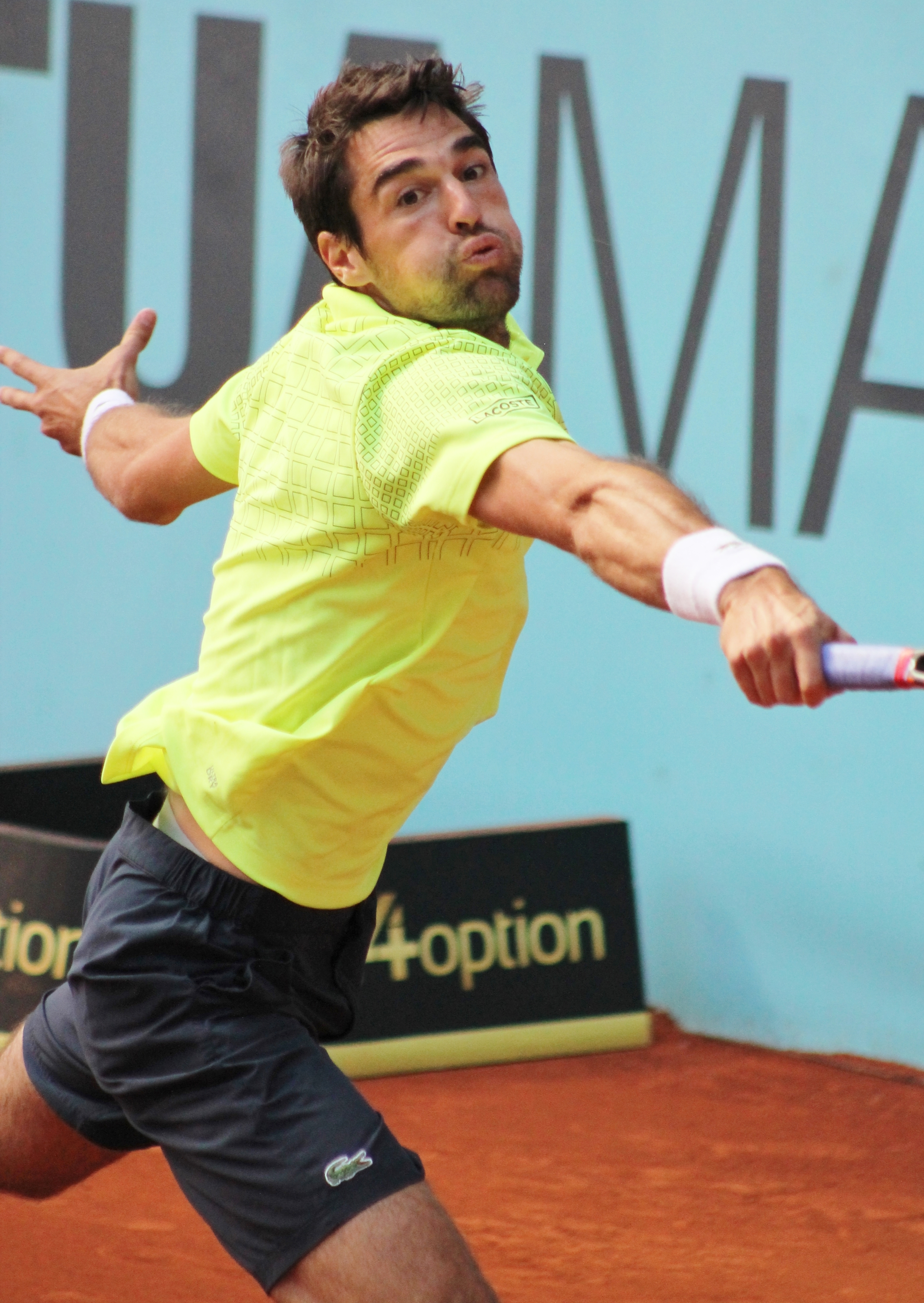 Chardy MA14 (15)